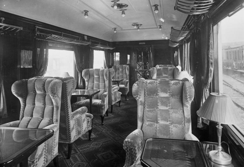 Der schönste Zug Deutschlands! Der Rheingold-Express, welcher zwischen Hoek van Holland, Köln, Basel und Luzern verkehrt, ist jetzt zwei Jahre in Betrieb! Blick in den Salon-Wagen I. Klasse mit seinen schweren Gobelin-Klubsesseln im Rheingold-Express.